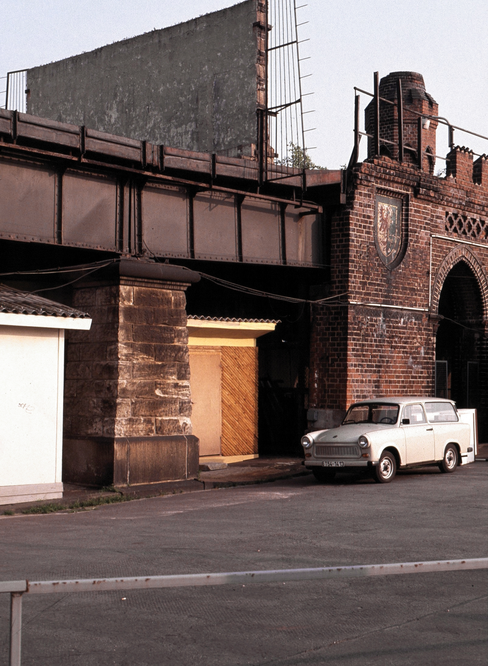 "Innere Mauer" am ehem. Bahnhof Stralauer Tor (Osthafen)